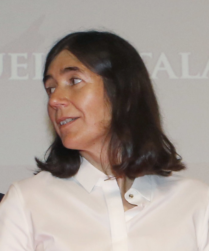 Ana María Manero Salvador (investigadores menores de 40 años) y María Blasco Marhuenda (premios Miguel Catalán 2015) junto a Cristina Cifuentes